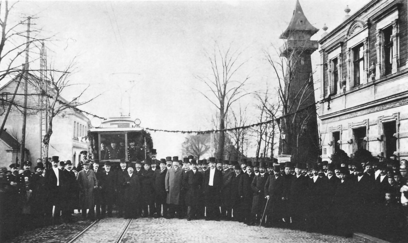 Nordrhein-Westfalen, Essen-Frintrop: Einweihung Straßenbahnlinie 4 am 15. November 1910 auf der Frintroper Straße; rechts der hölzerne Aussichtsturm bei der Gastsstätte Voßkühler, der bis 1917 existierte.